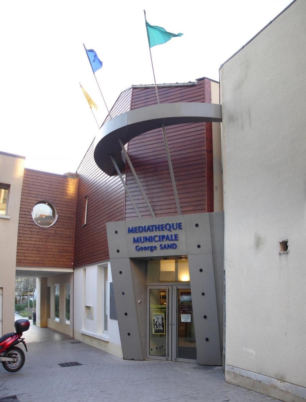 La mediathèque George Sand - Enghien-les-Bains (France)